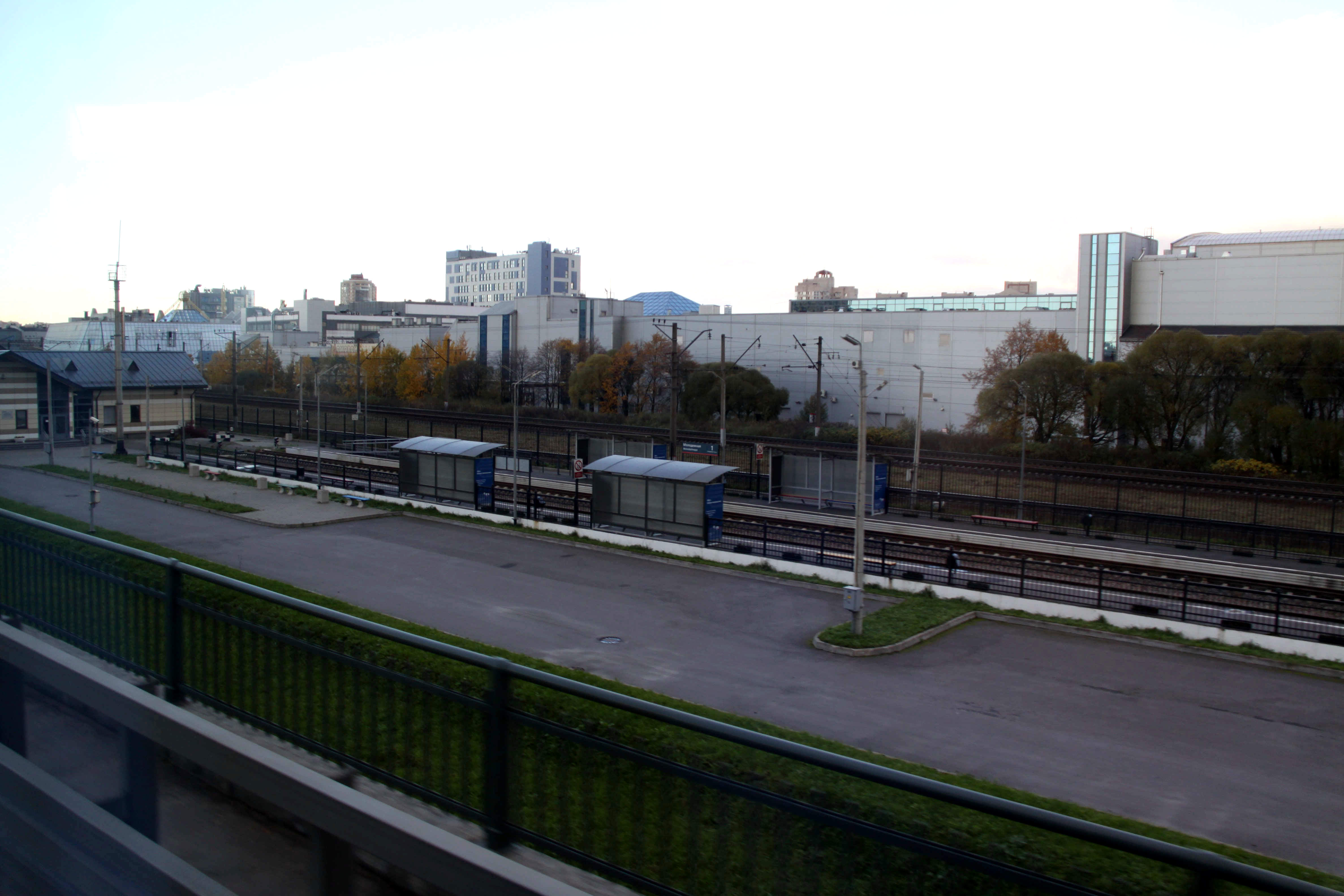 Station Molodezhnaya St. Petersburg